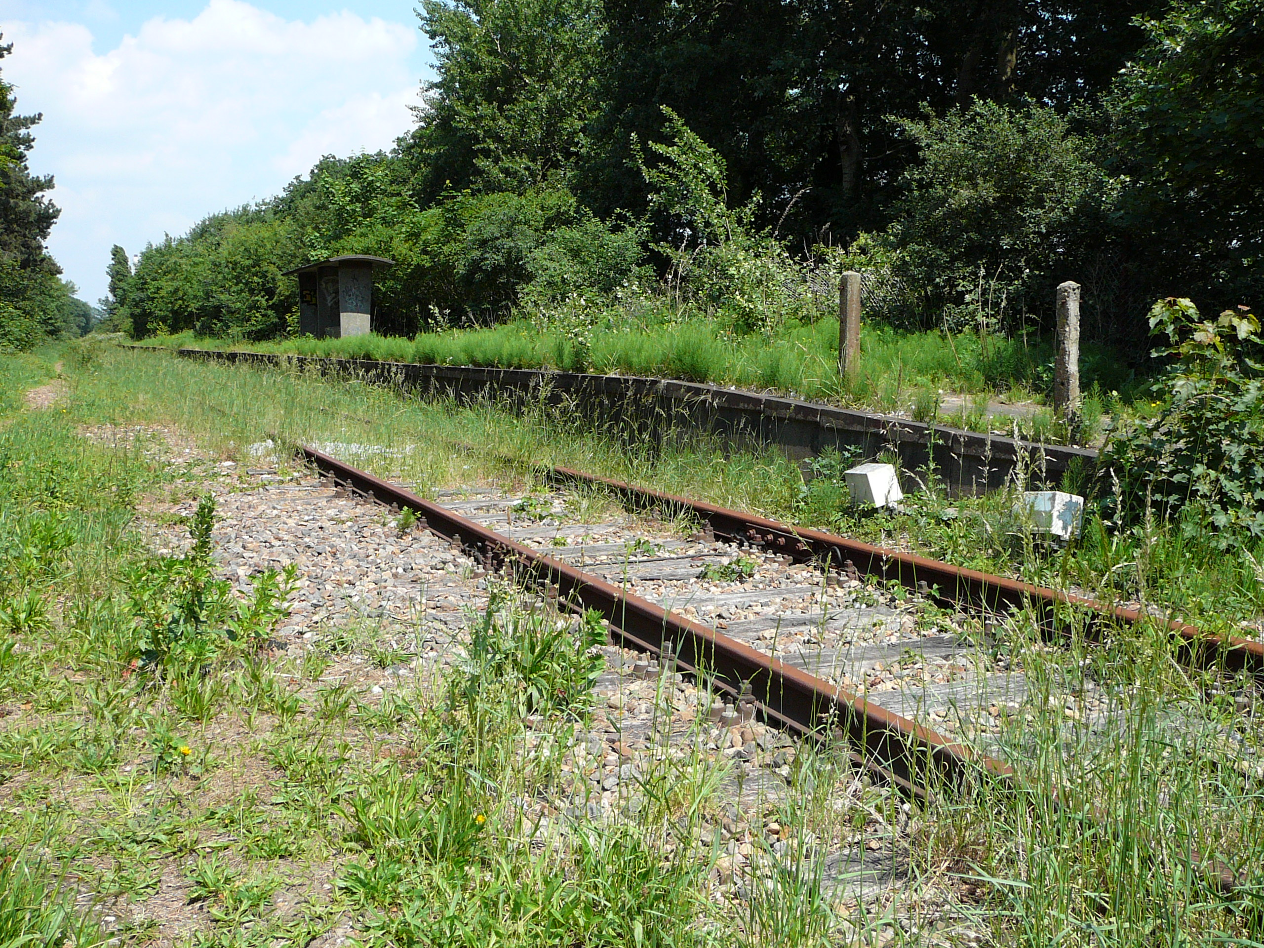 voormalig station Velsen Zeeweg